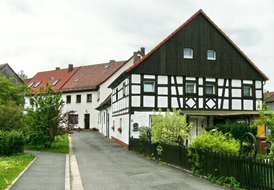 Kasernenstraße in Glashütten (Oberfranken)